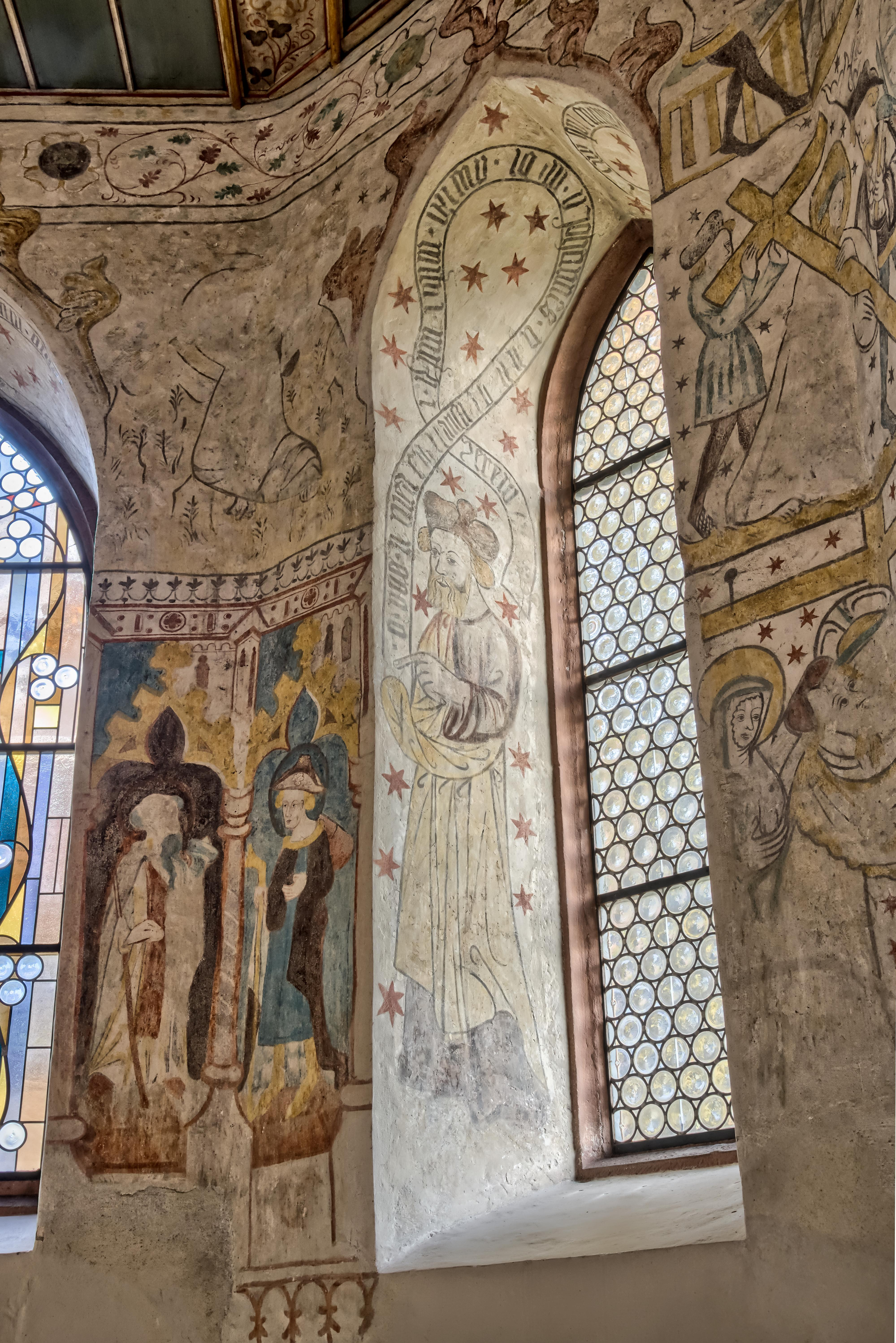 Bilder von St. Laurentius in Bischoffingen Fenster 3 linke Seitenwange Jeremia